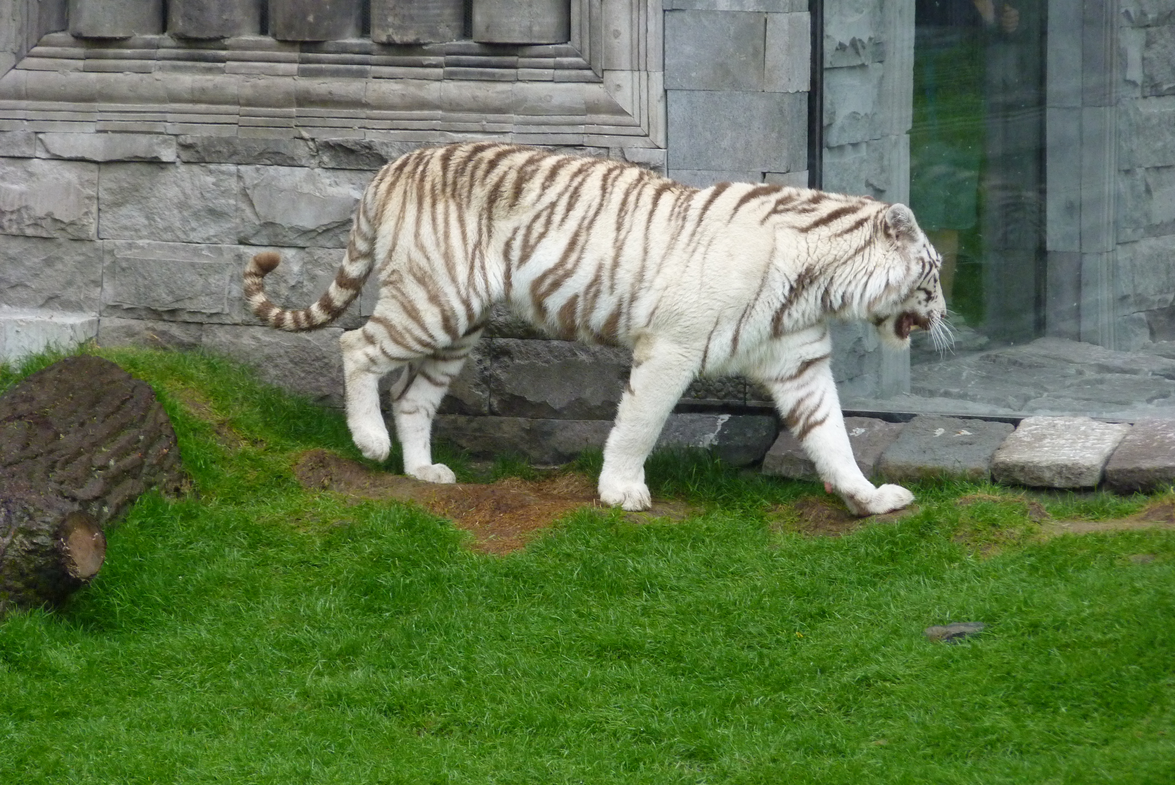 Пайри Дайза, зоопарк в Бельгии, белый тигр